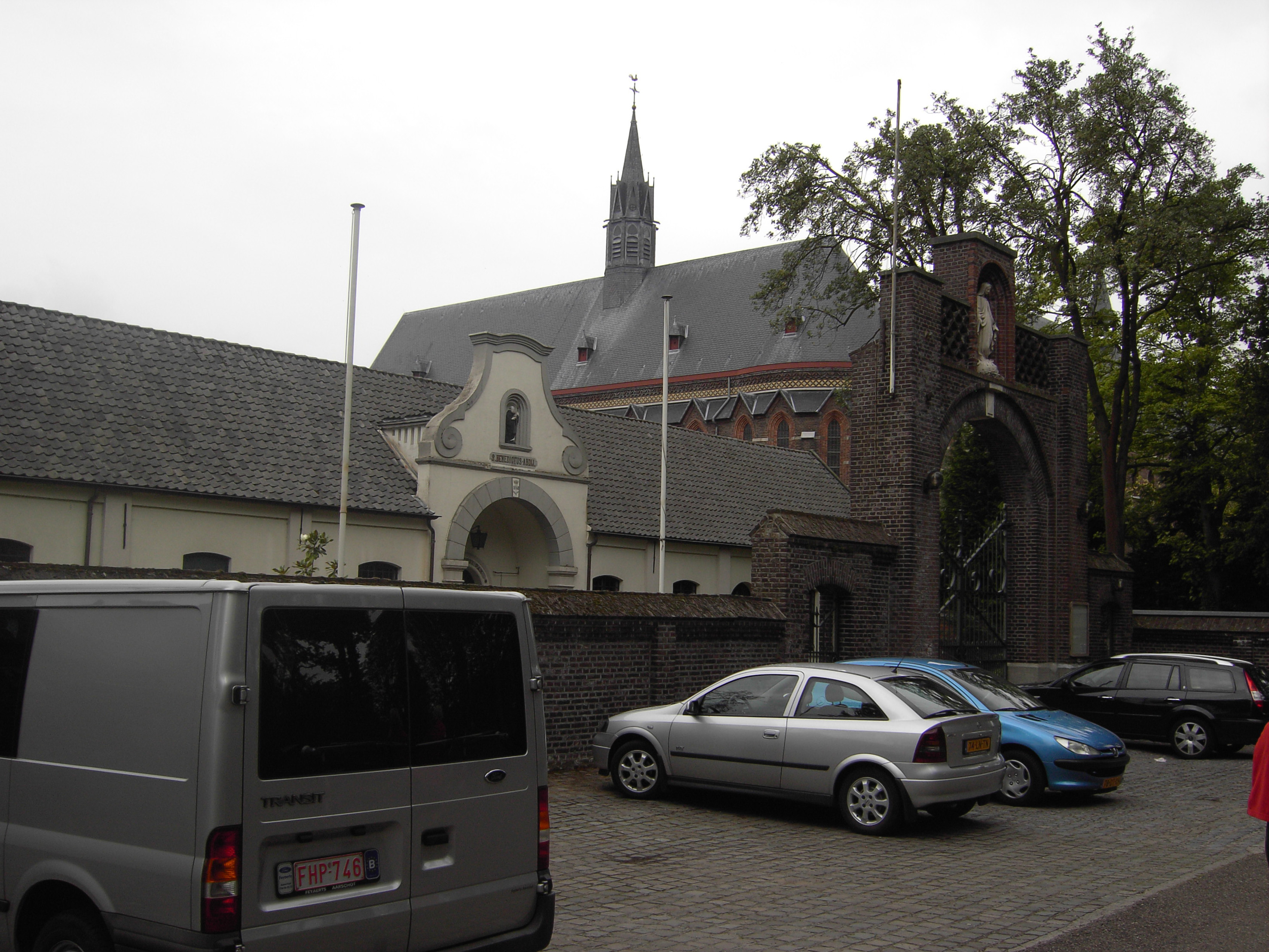 Hamont-Achel - Sint-Benedictusabdij